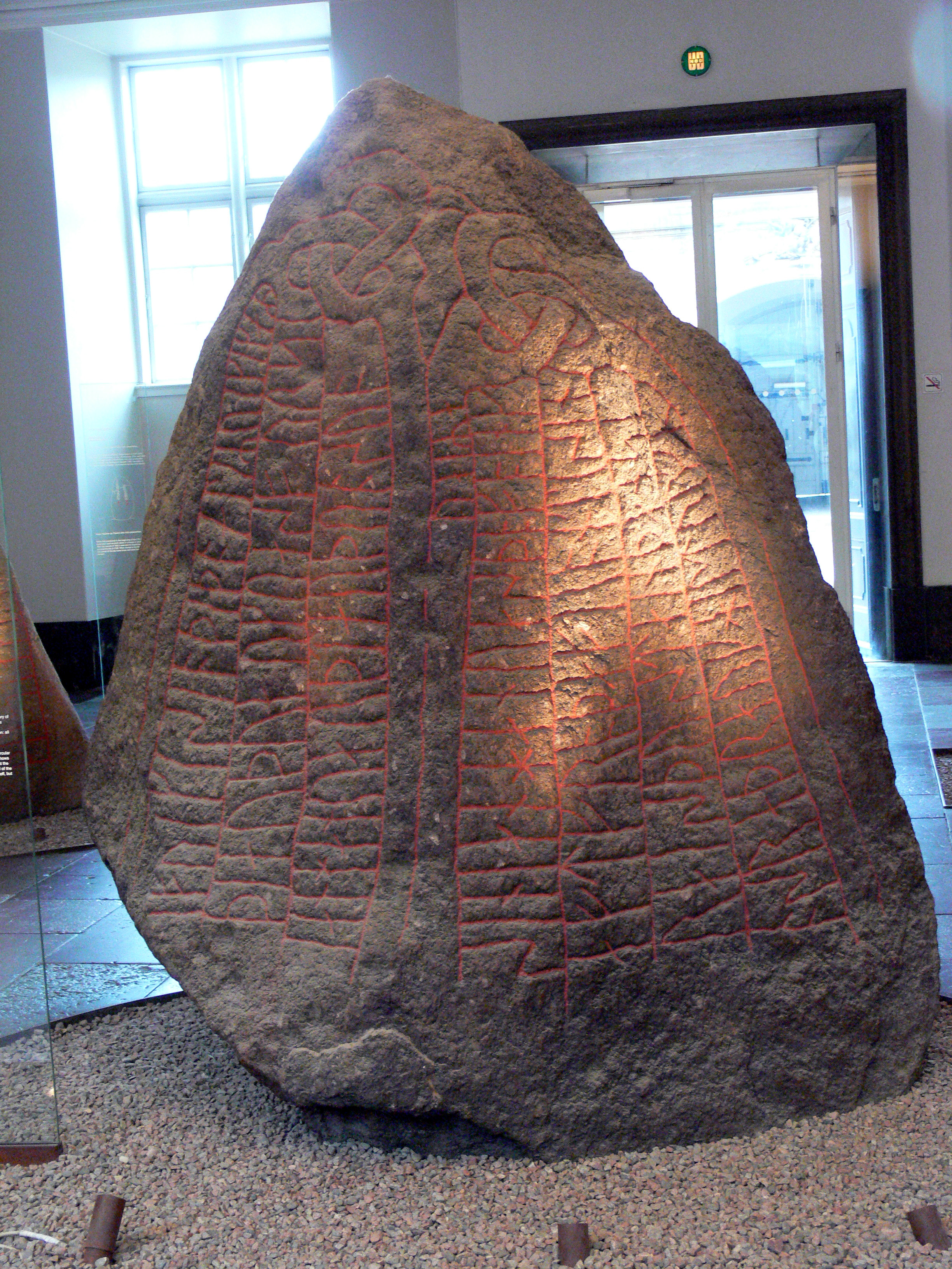 Runenstein von Tirsted. Späte Wikingerzeit. Text: Asrað und Hildung errichteten diesen Stein nach Fræði, ihrem Verwandten. Er war damals ein beutegewohnter Kriegsmann (oder: ein Schrecken der Männer). Er fand den Tod in Schweden ... und danach alle Wikinger...